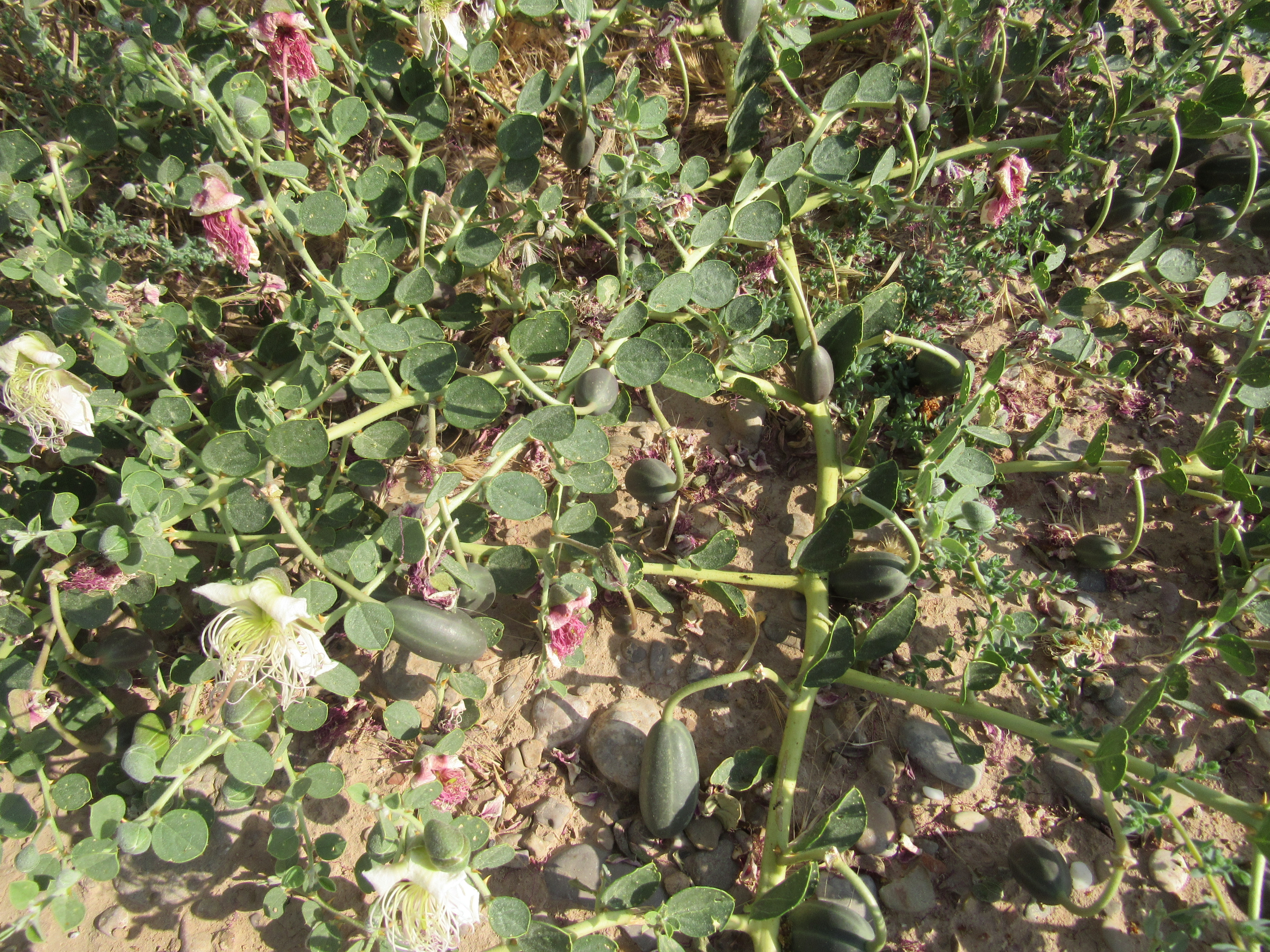 گیاهی بوته مانند است و دارای شاخه‌های چوبی باریک و دراز است که شاخه‌های کهنسال آن بی برگ ولی شاخه‌های جوان آن دارای برگ‌های کوچک، باریک و به درازای 12-4 میلیمتر و منتهی به نوک خار مانند است.